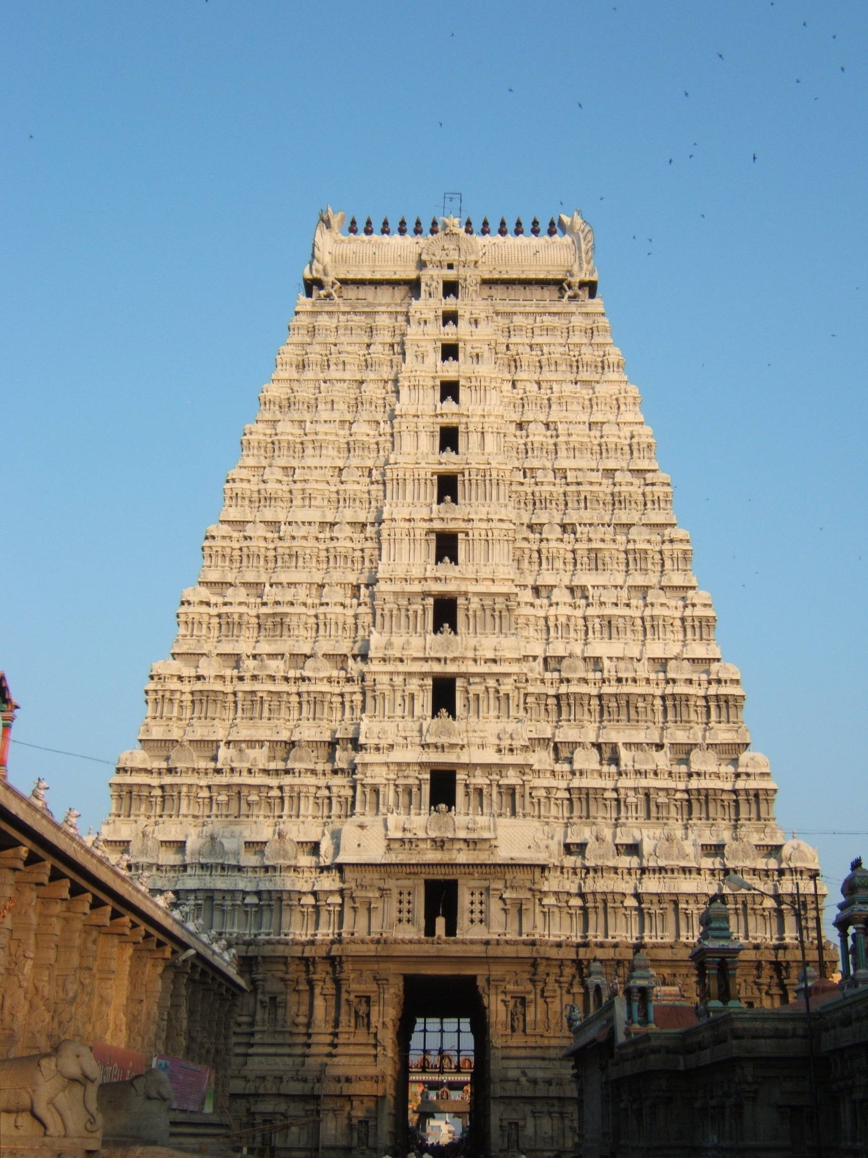 Arunachaleshvara_Temple_Tiruvannamalai Tamil Nadu, India